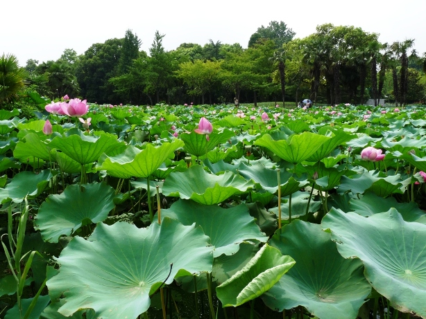 Teich im Botanischen Garten Shanghai mit Nelumbo nucifera